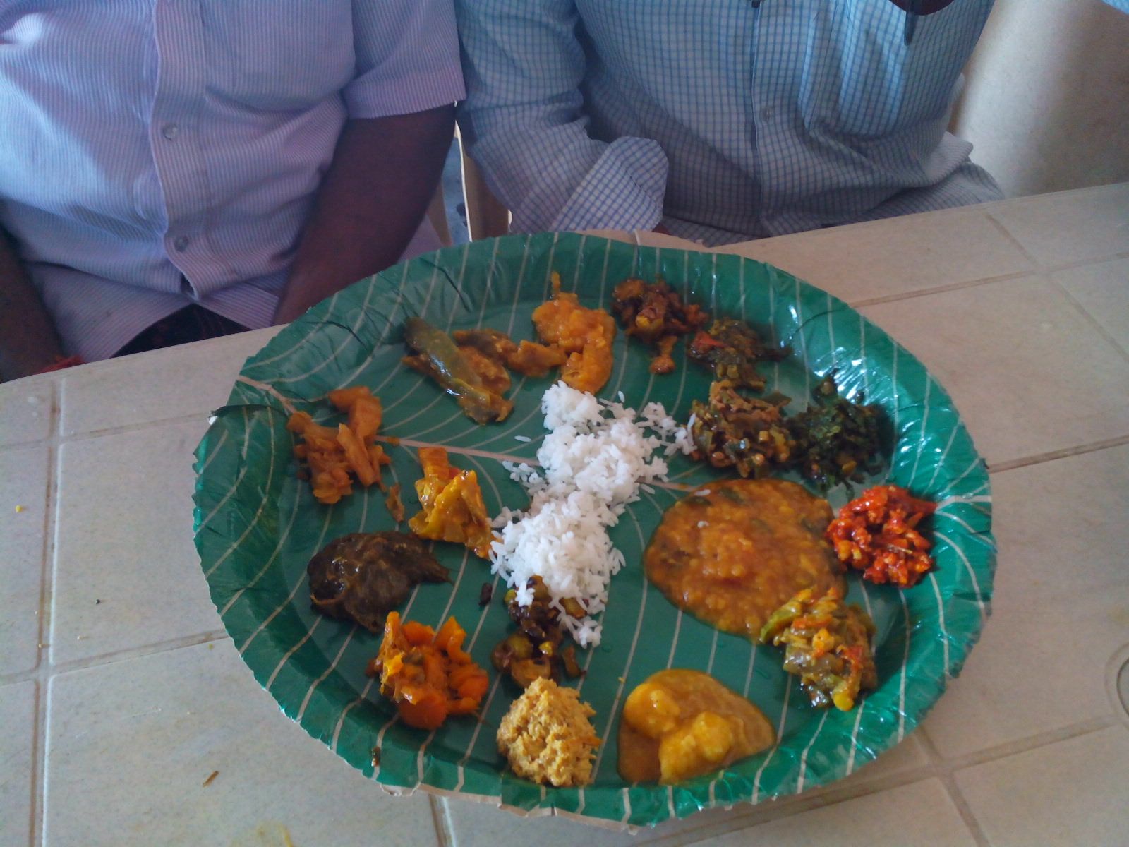 ఖమ్మంజిల్లా కూసుమంచి గ్రామంలోని నాగన్న హోటల్